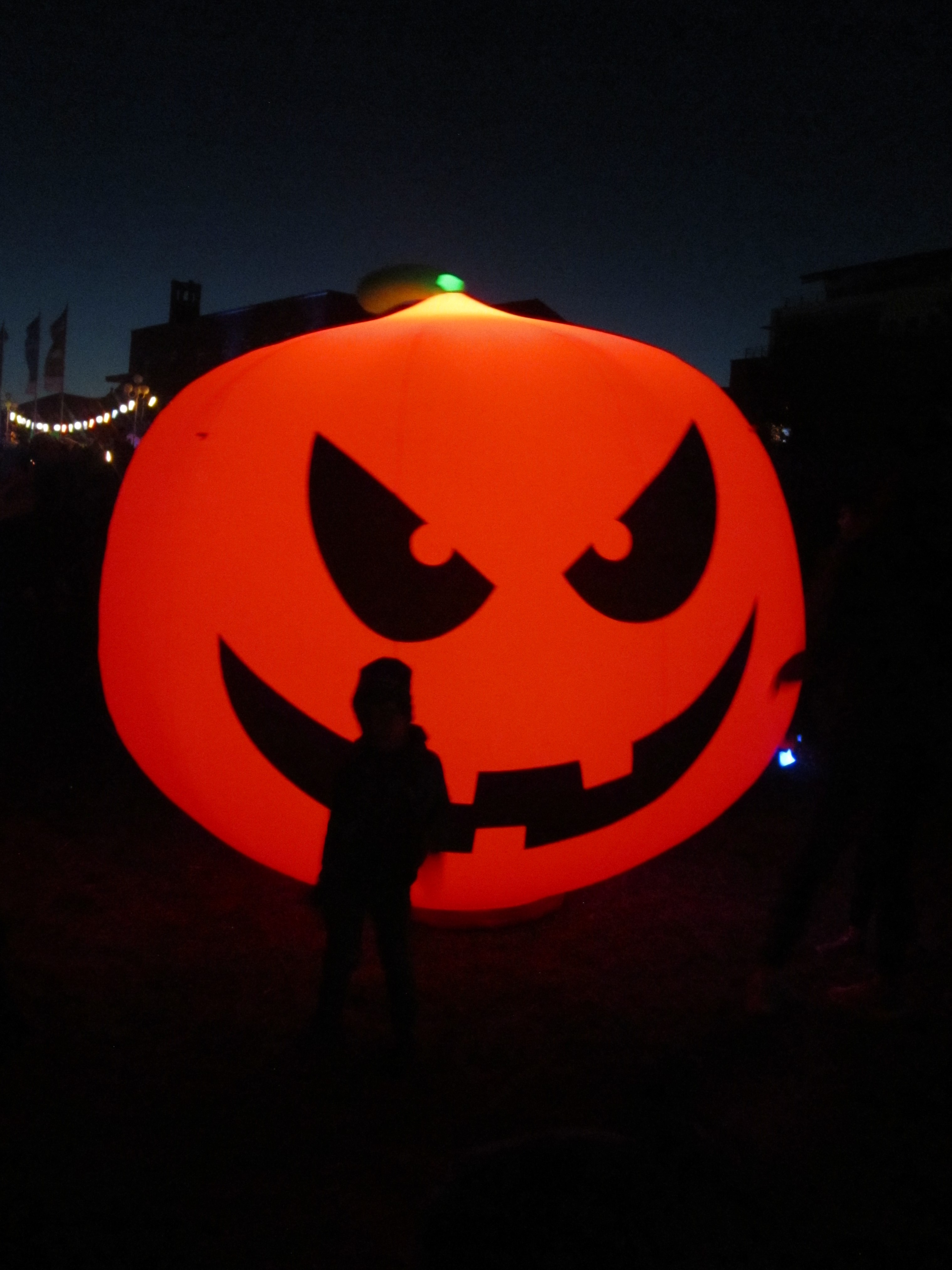 Illuminierter aufgepumpter Riesen-Kürbis. Installation am Südstrand Wilhelmshaven während des Lichterfests "LichterMeer" 2019.